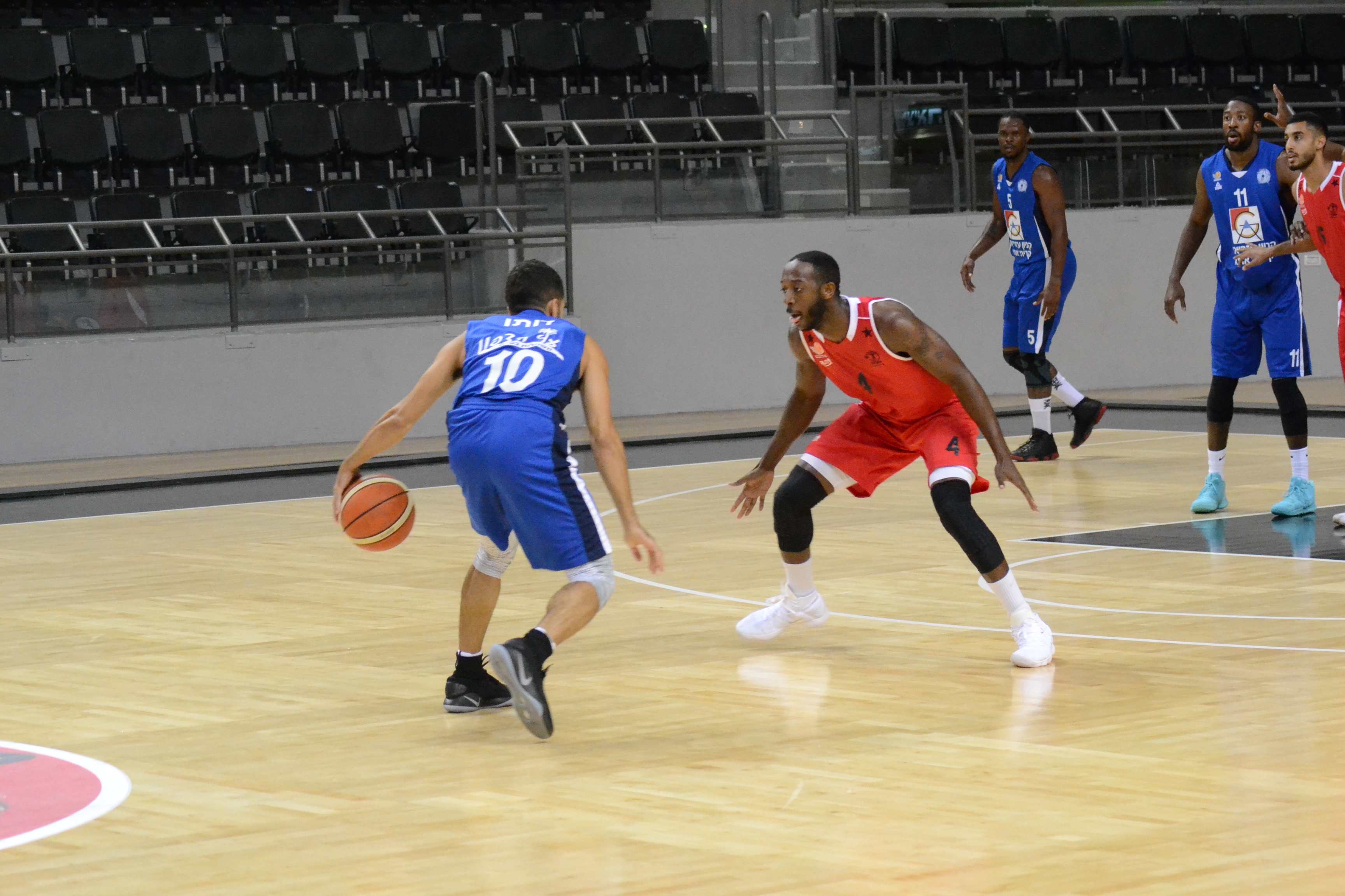 משחק במסגרת שלב הבתים בגביע הליגה הלאומית בין קריית אתא להפועל חיפה עונת 2017/18